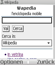 screenshot of license: public domain